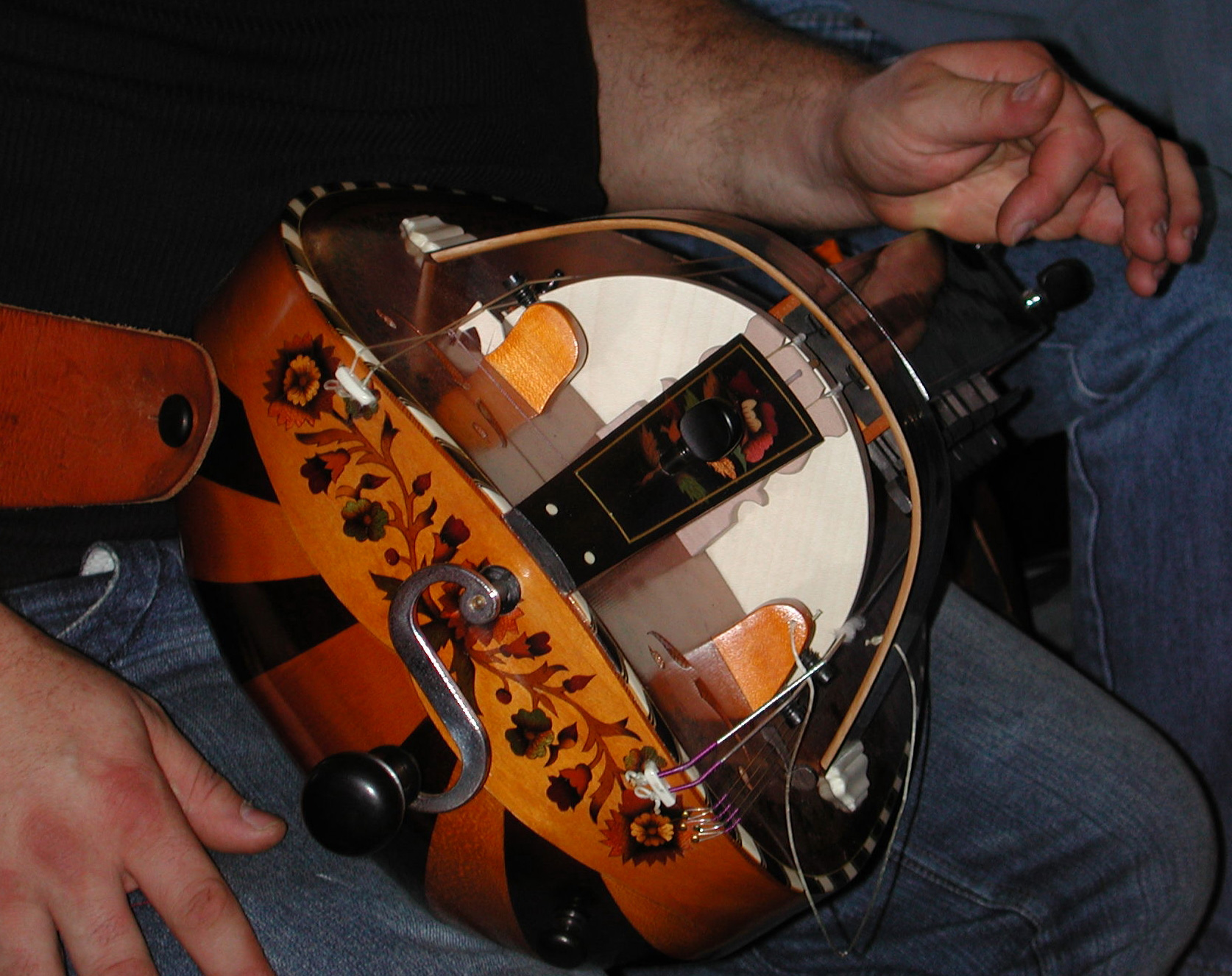 Foto scattata da me e pubblicata nei termini della licenza GFDL